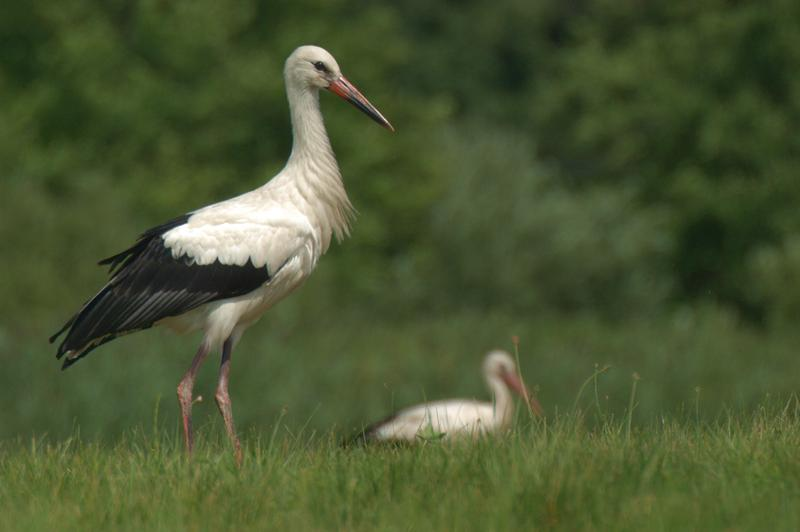 Auteur : Sylvain HAYE Prise en Pologne